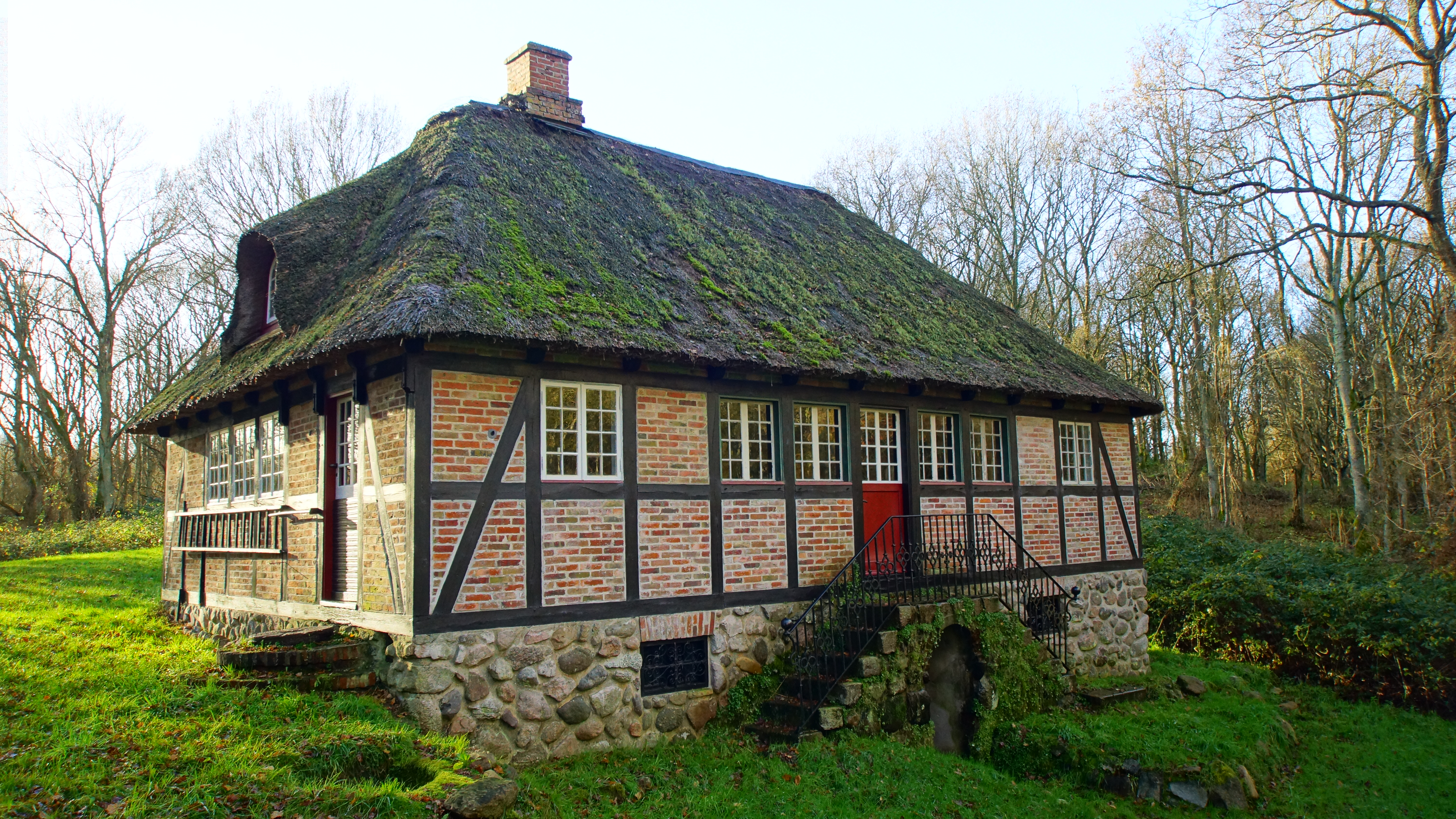 Egil Fischer Sommerhus 2